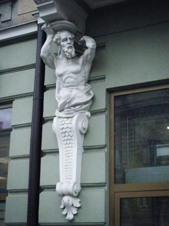 Atlant1_Ulica_Slowackiego1_Jarosław